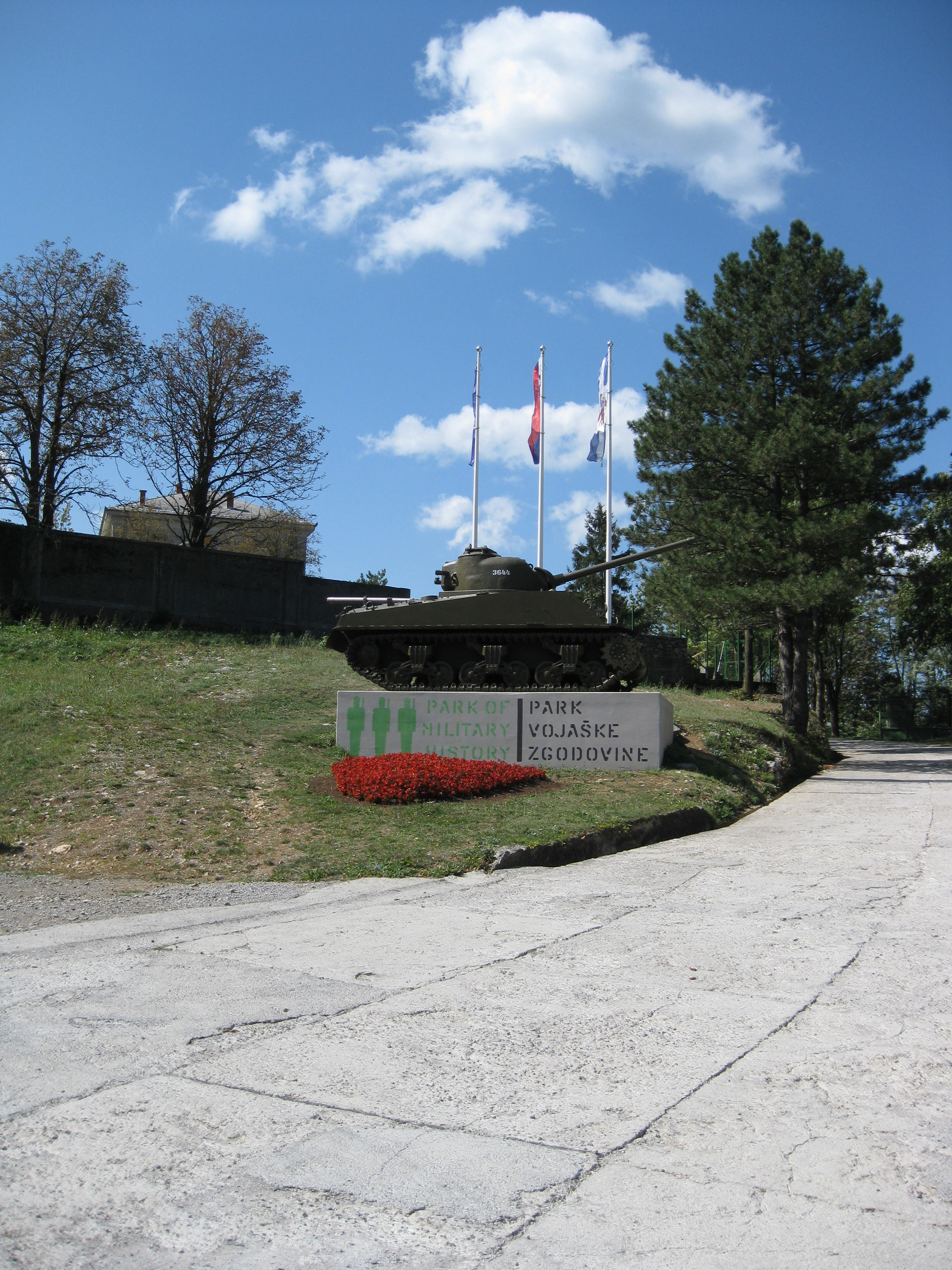 Park für Militärgeschichte in Pivka, Slowenien